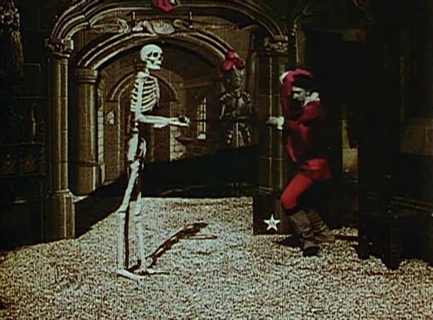 Méliès, Le château hanté (Star Film 96, 1897)